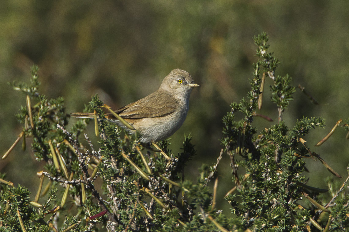 Desert Warbler - Kazakistan_S4E2551